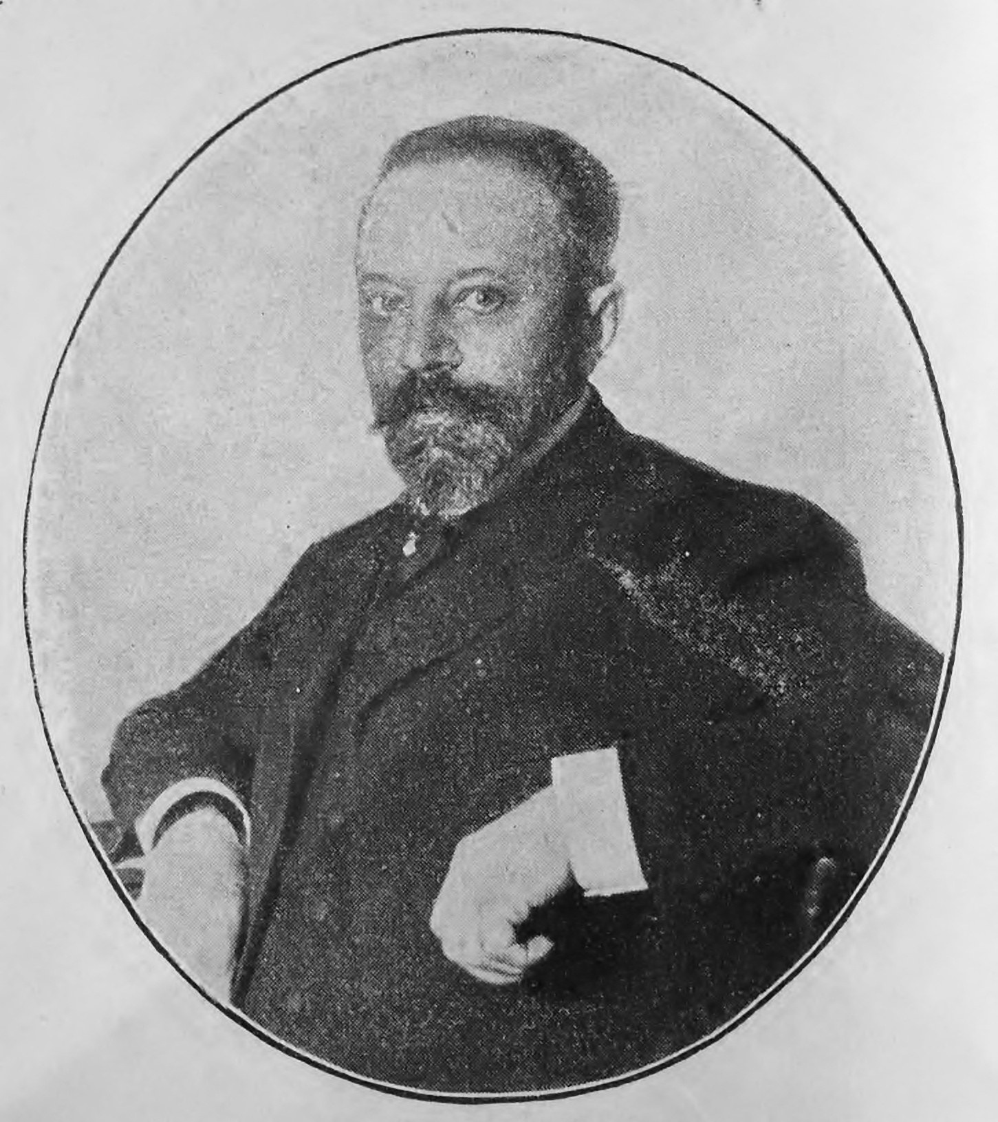 Portrét Michail Ivanovič Čigorin